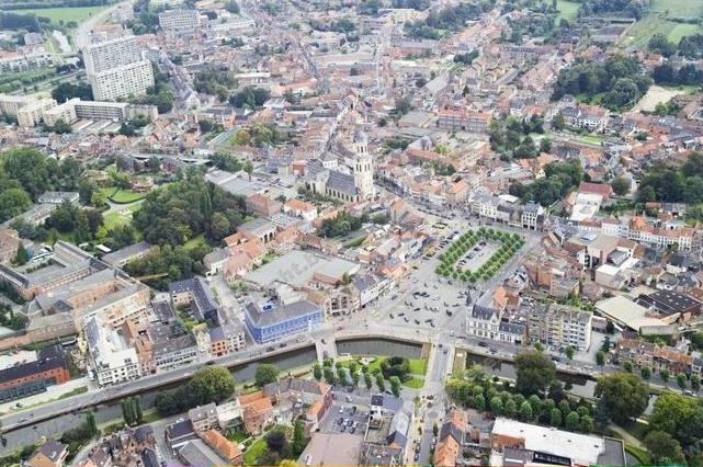 luchtfoto van de stad lokeren met zicht op de Grote Markt